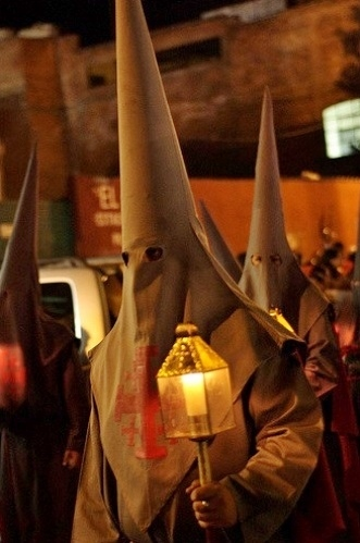 Nazareno de la cofradía de Santa Cruz